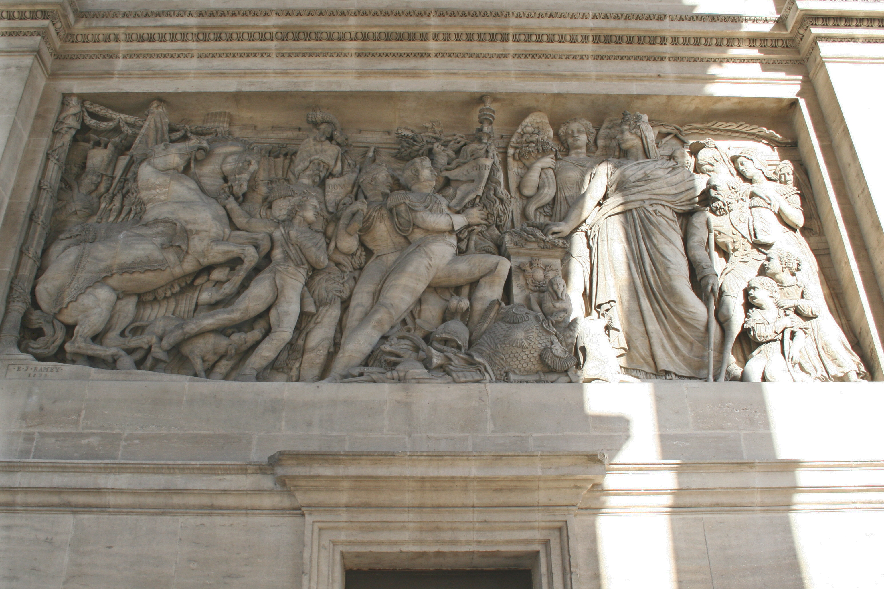 Arc de triomphe de Marseille, bas relief de étienne Ramey situé sous l'arcade représentant la France distribuant des couronnes à ses enfants.